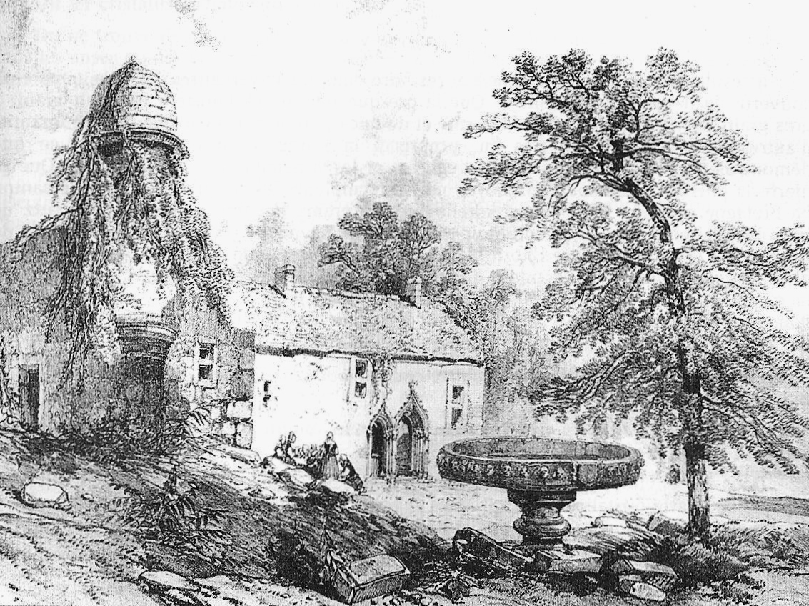 Le Rusquec en 1846 (écrit Le Rusquet dans la légende de la gravure publiée dans l'ouvrage Voyages pittoresques et romantiques ... qui le décrit ainsi : "On passe près du château ruiné du Rusquec, ses murs sont couverts de lierre, et les bosquets du jardin, formés de vieux lilas abandonnés ; la cheminée principale a douze pieds de largeur ; le bassin principal est formé d'une seule pierre de granit de douze pieds de diamètre et vingt pouces d'épaisseur, et de vingt pouces de profondeur")